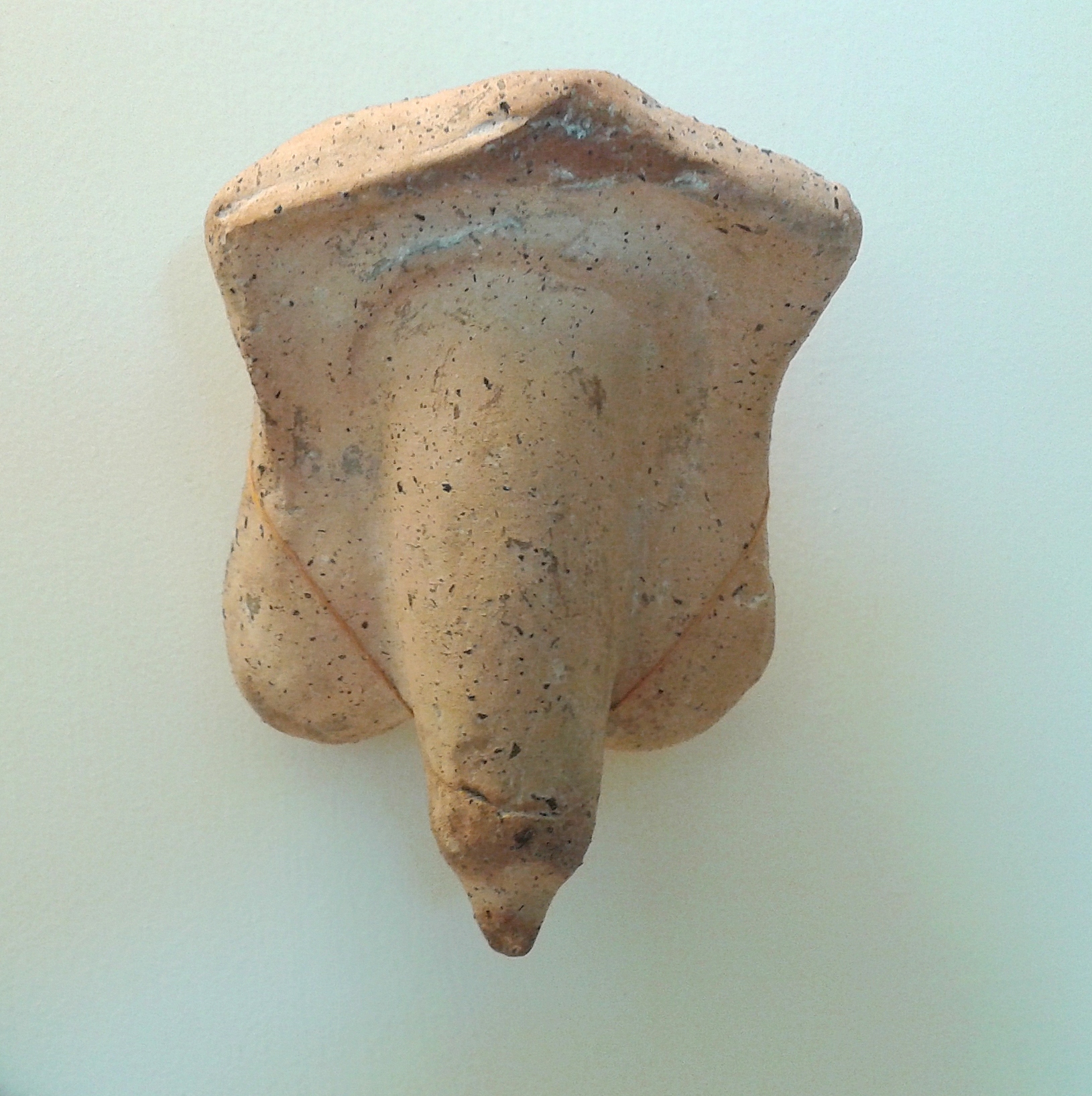 Amuleto fálico. Terracota, 9 x 7 cm. Acervo de arqueologia do Mediterrâneo - Museu Nacional/UFRJ, Rio de Janeiro, RJ, Brasil.